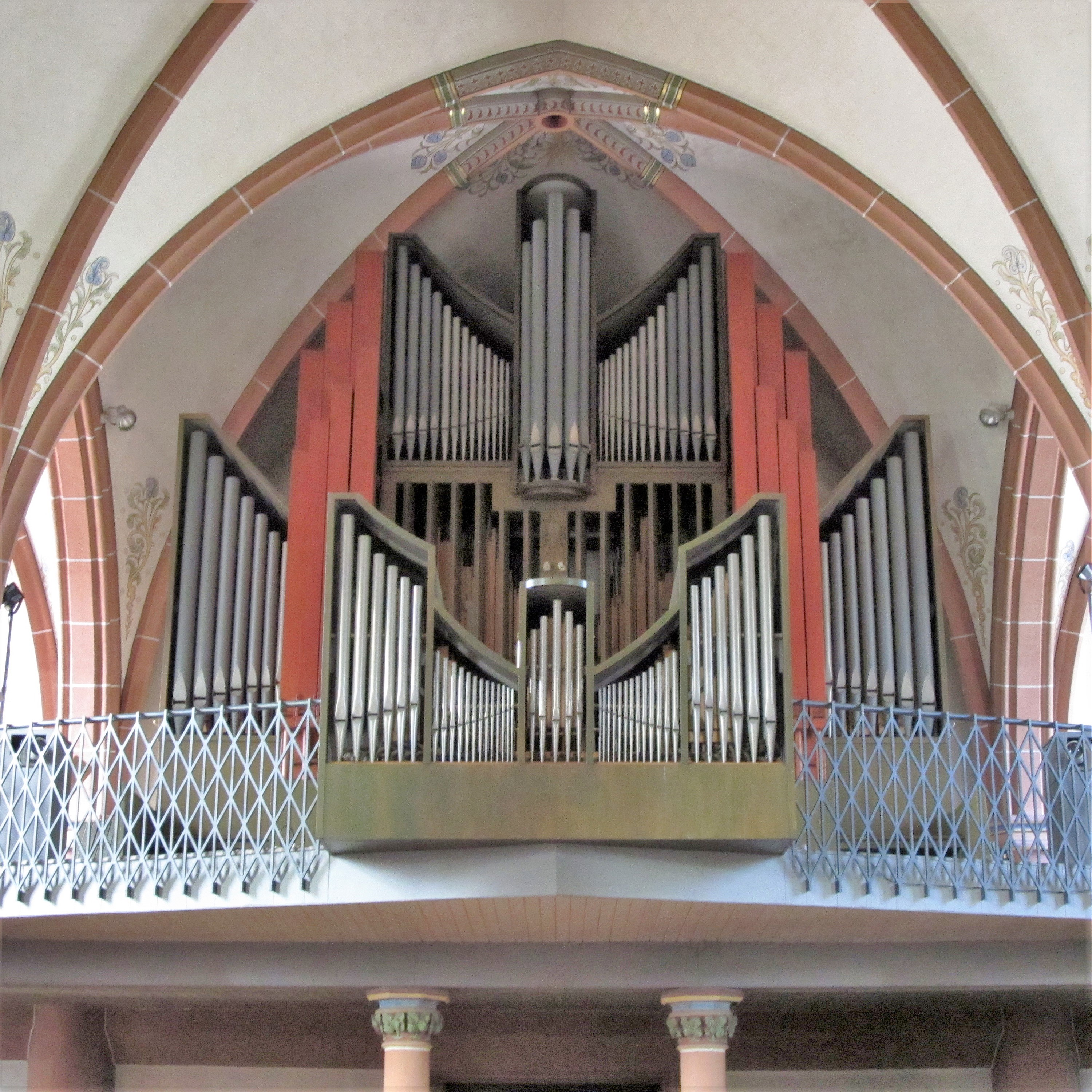 Orgelprospekt der katholischen Pfarrkirche St. Ludwig in Spiesen, Saarland